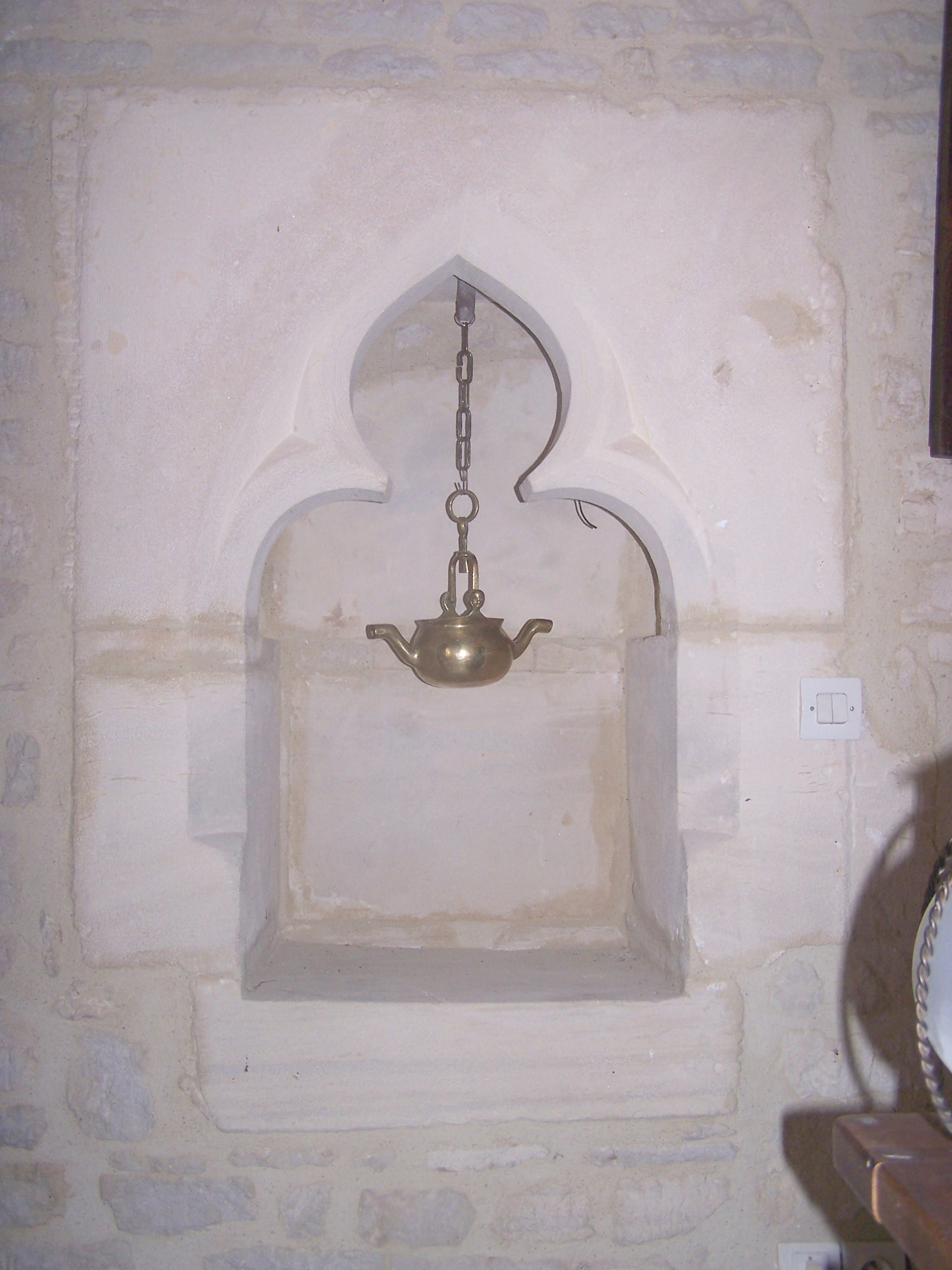 Vous pouvez voir sur cette image une puisette, dans son emplacement d'origine c'est à dire un lavabo médiéval